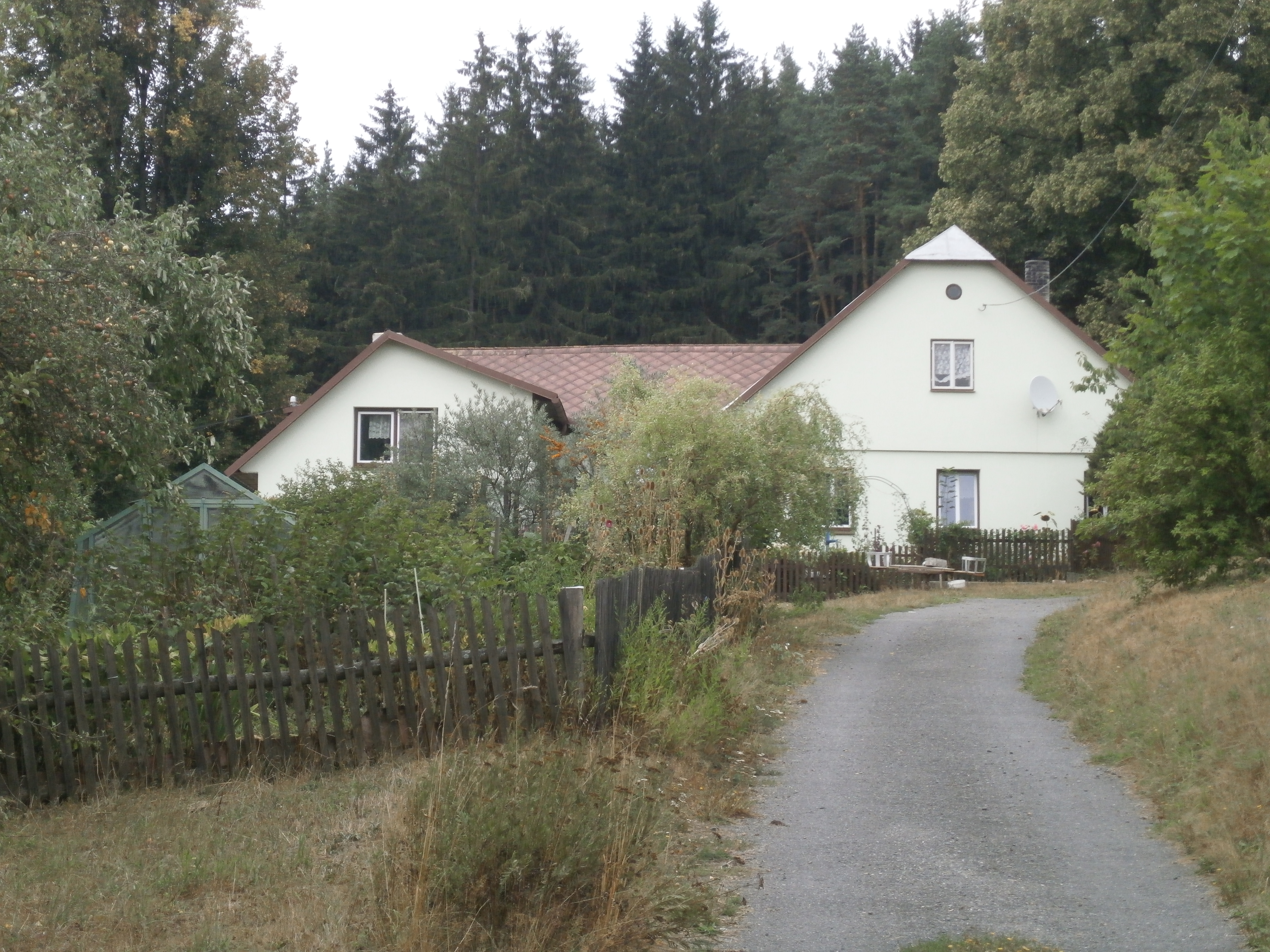 Mrhov - č.p. 1